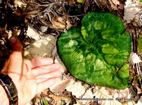 نبات برّي سوري يؤكل